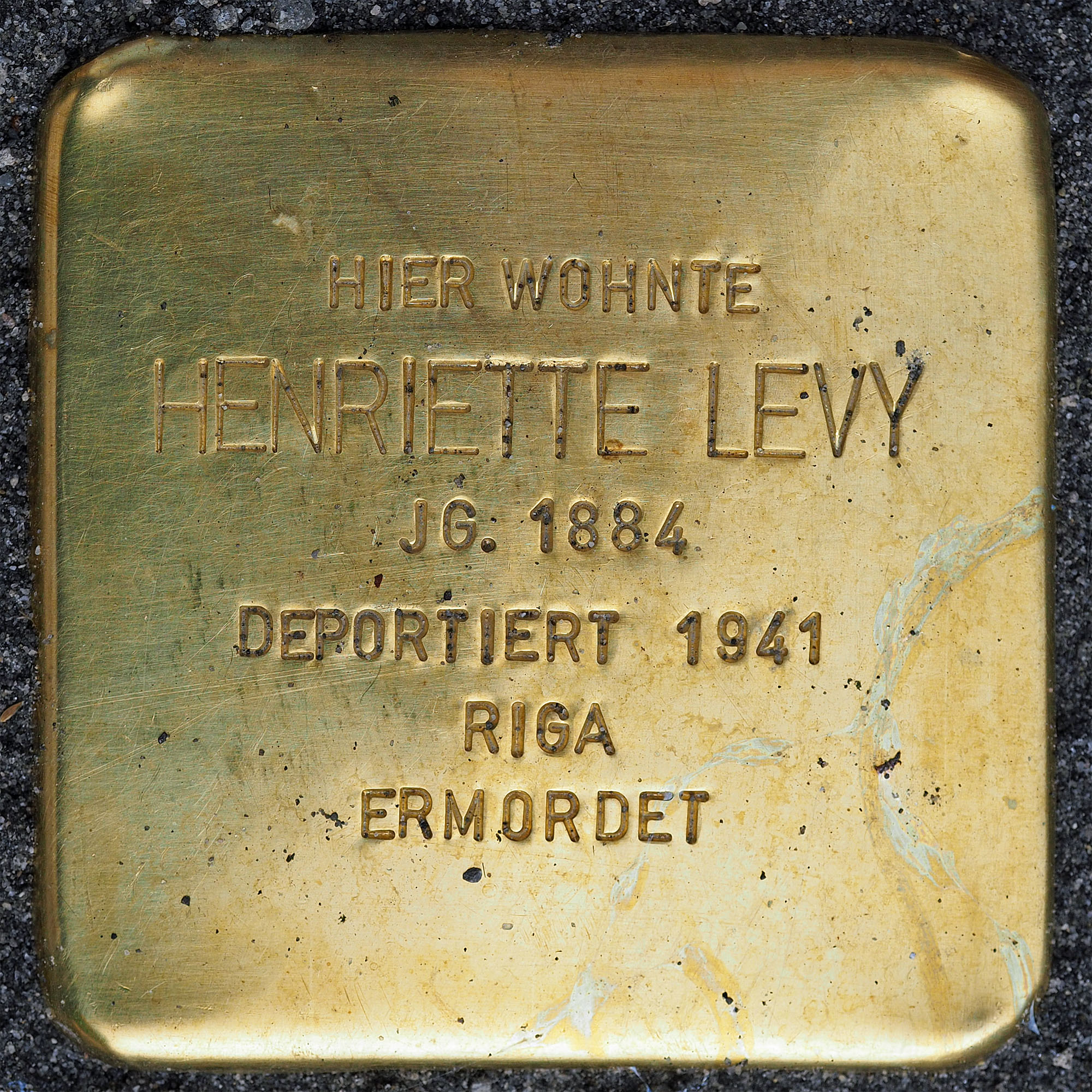 Stolpersteine Schwalmtal: Henriette Levy